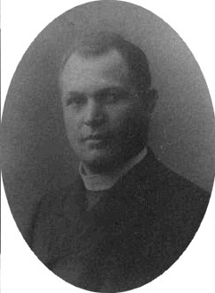 Josef Samsour (1870 - 1930), Český římskokatolický kněz a profesor.